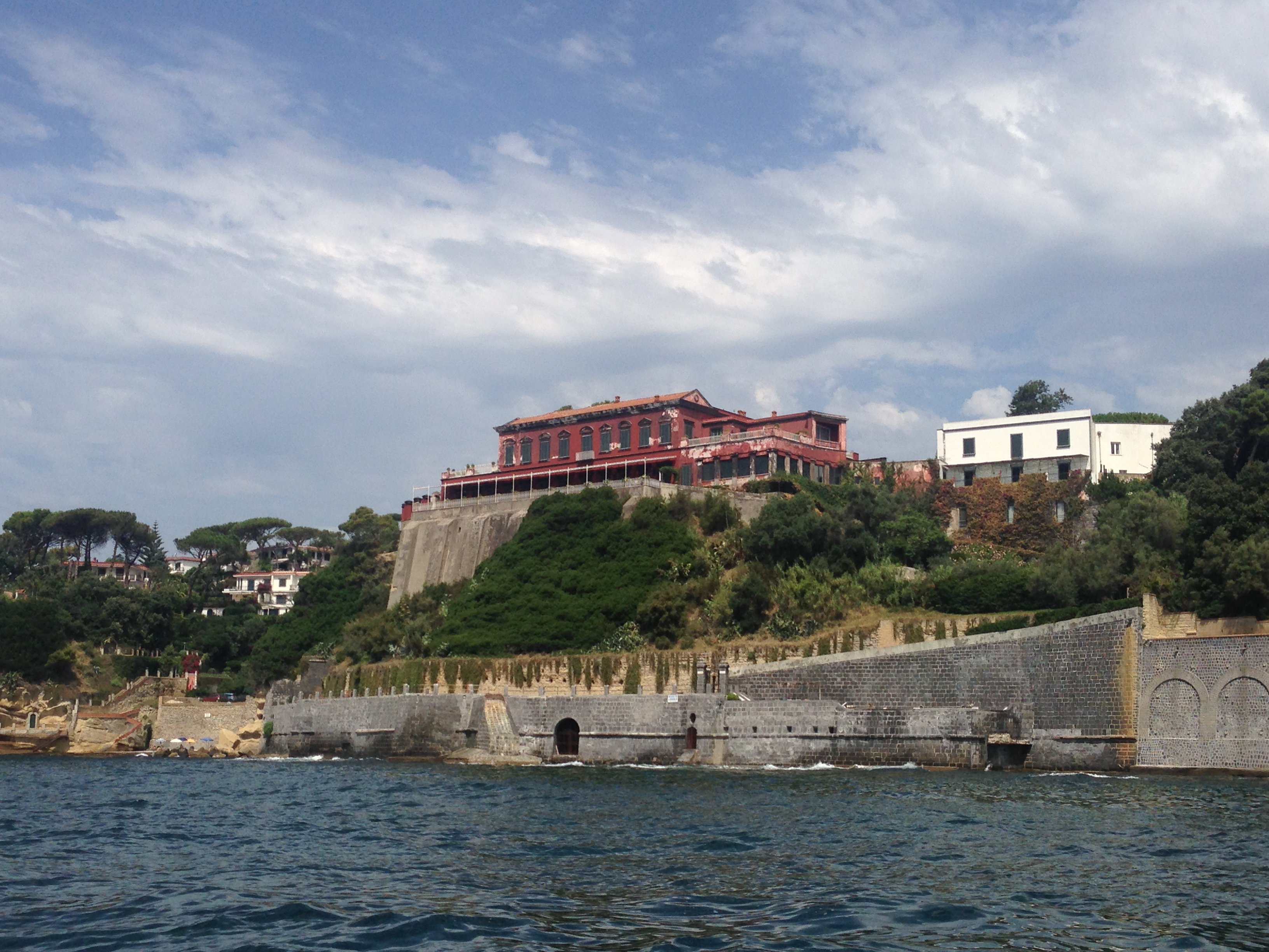 Villa Barracco vista dal mare